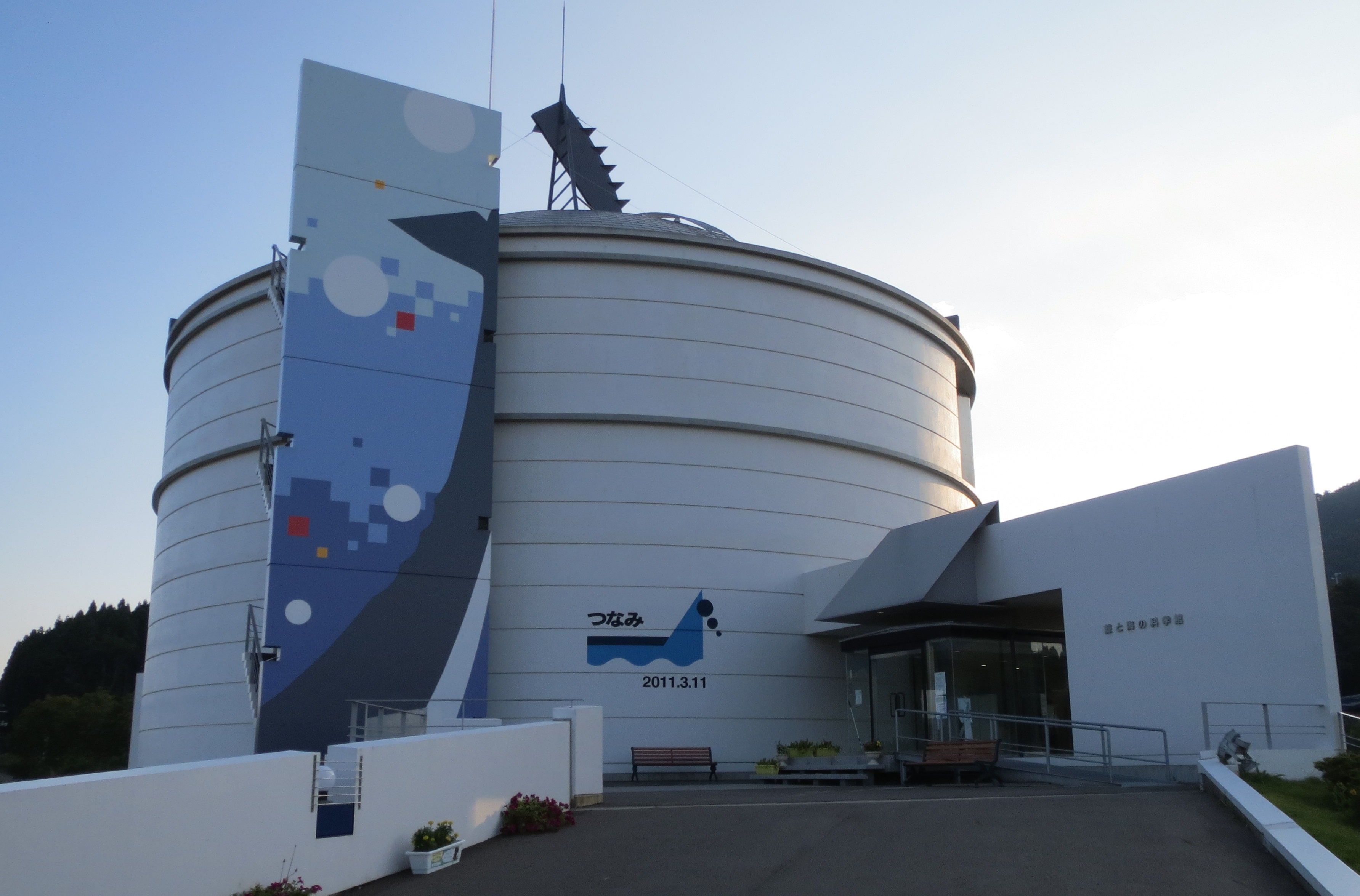 鯨と海の科学館 Canon IXY 3